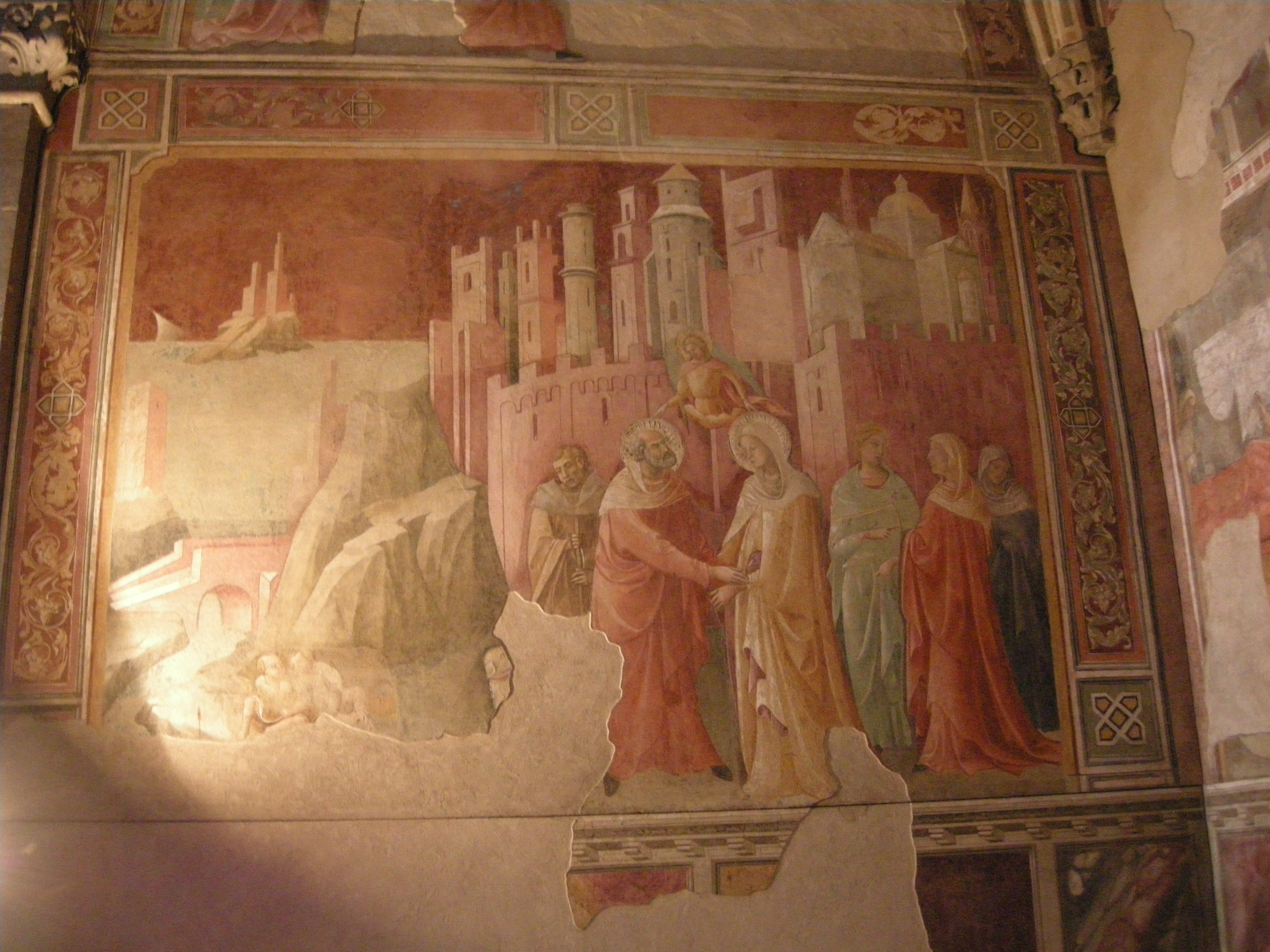 Cappella bartolini salimbeni, 02 incontro alla porta d'oro